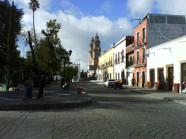 Jerez de García Salinas, Zacatecas